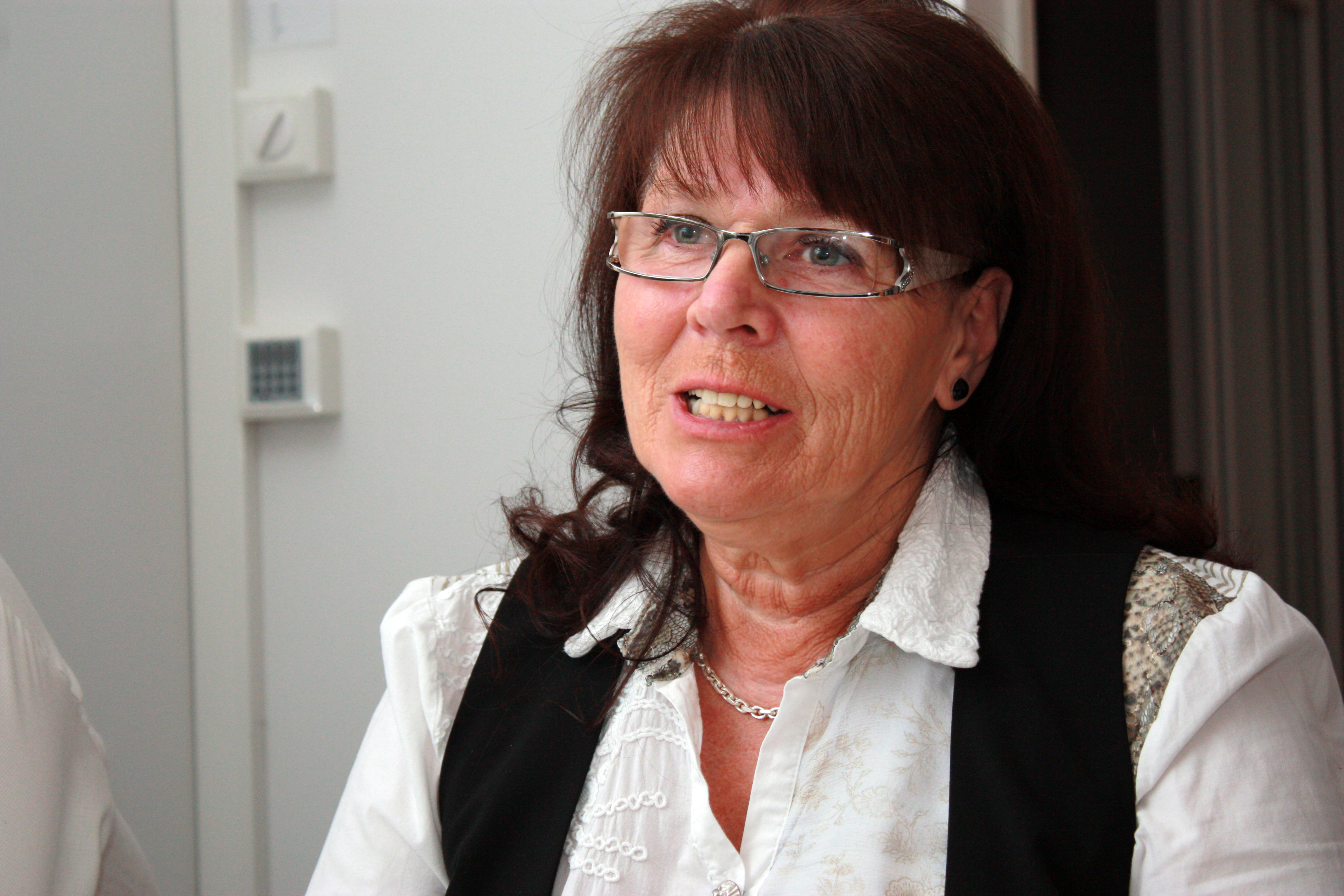 Marit Johansen